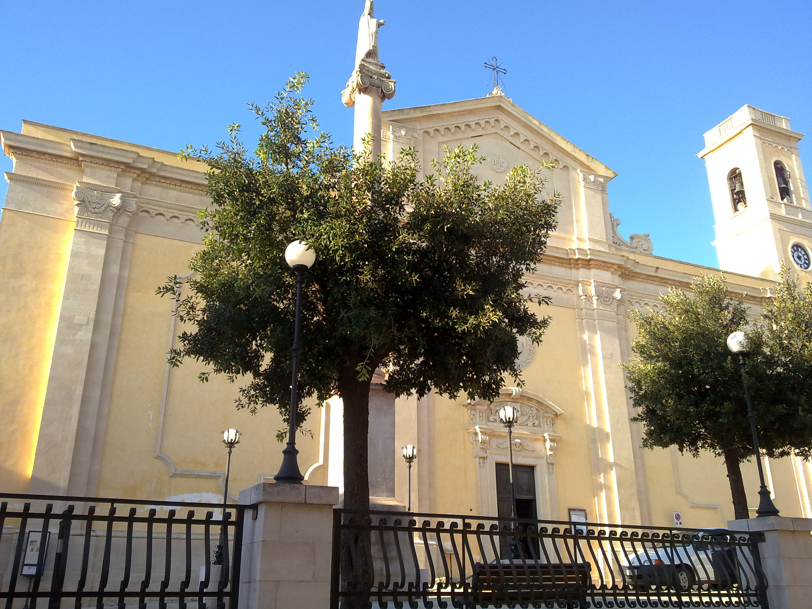 Chiesa di San Nicola Magno Salve, Lecce